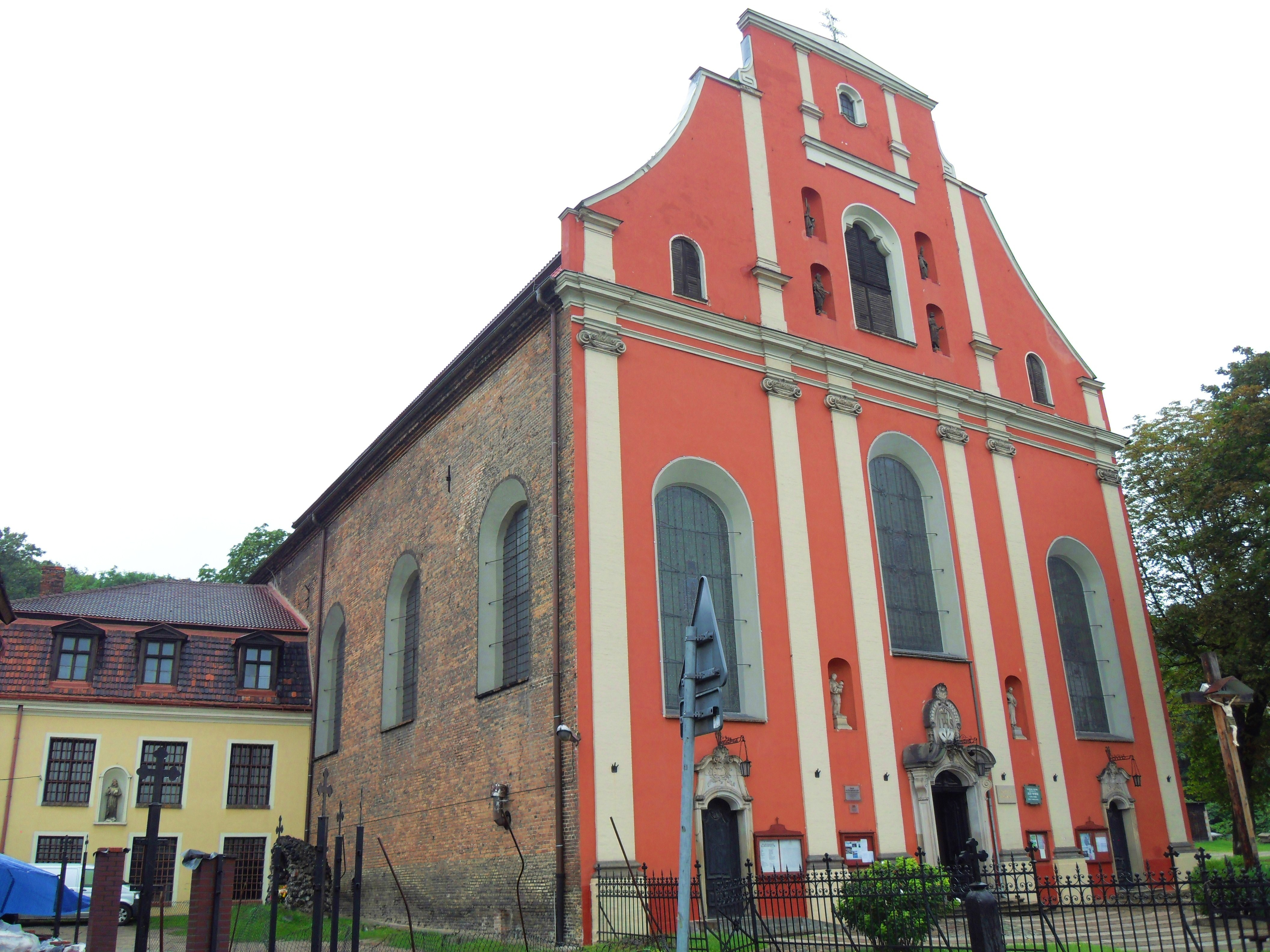 Gdańsk Stare Szkoty. Kościół św. Ignacego Loyoli.